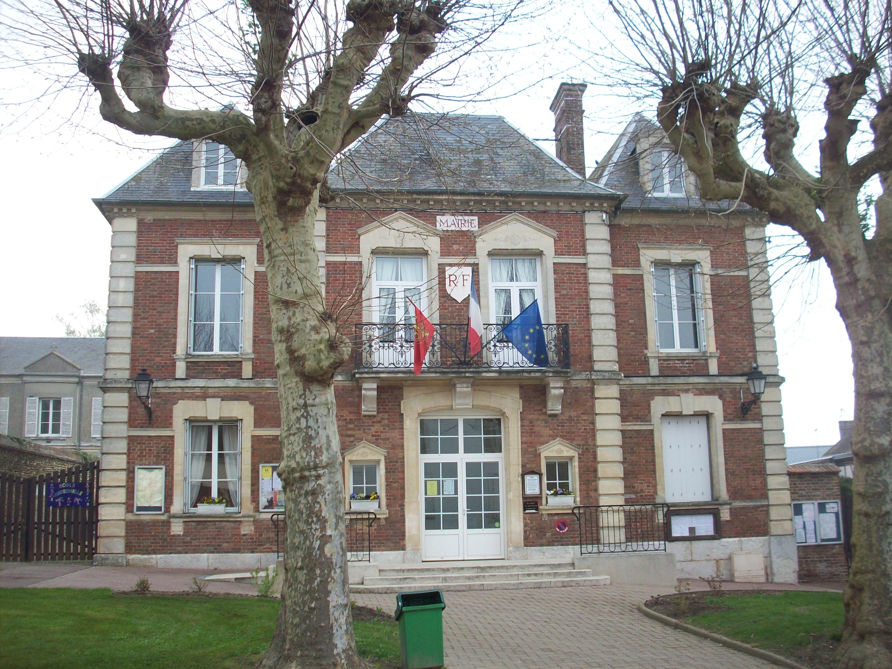 Mairie de Tourny.